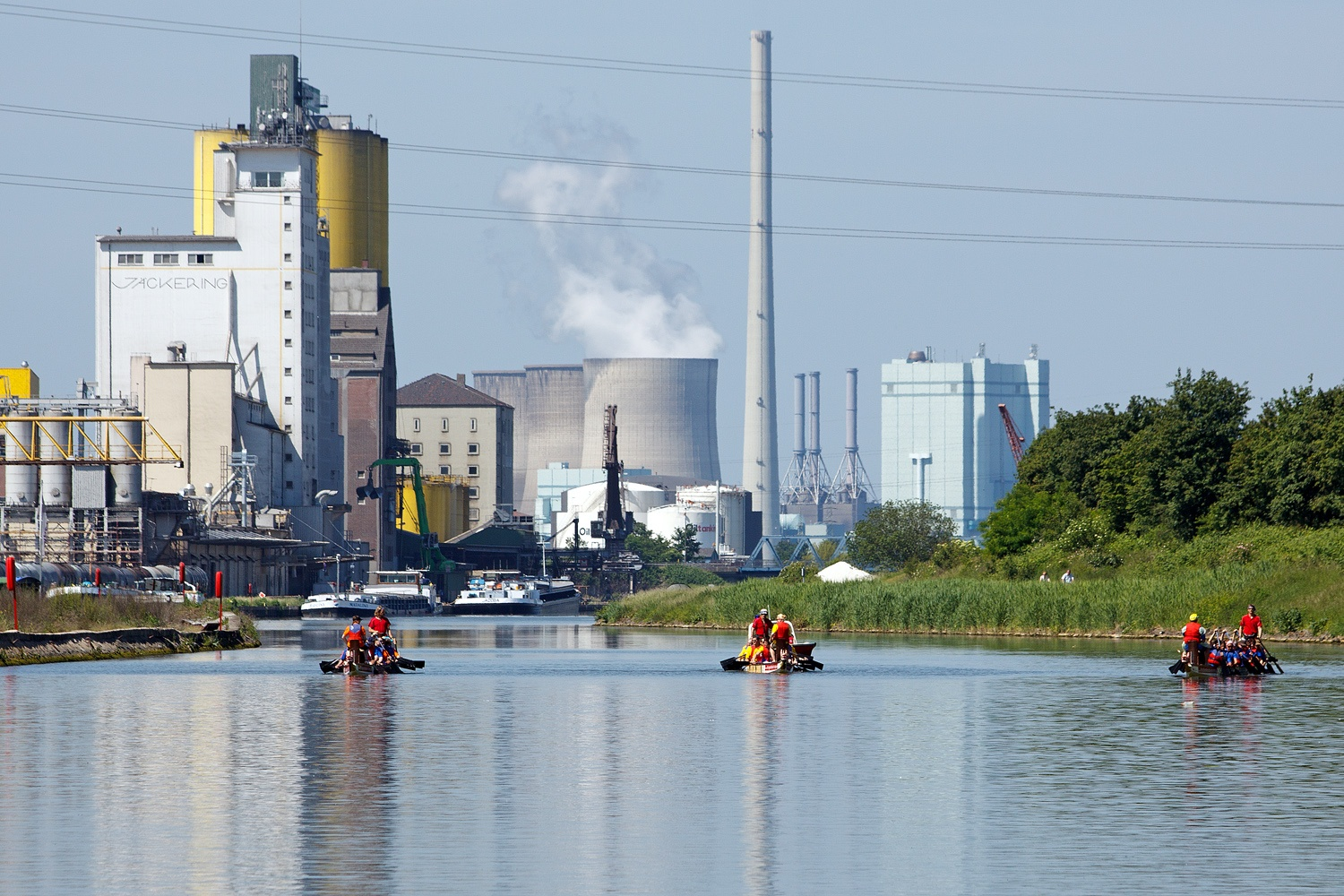 Aktivita, City-Kai, Datteln-Hamm-Kanal, Hamm, Datum/Uhrzeit: 05.06.2010 11:39:24